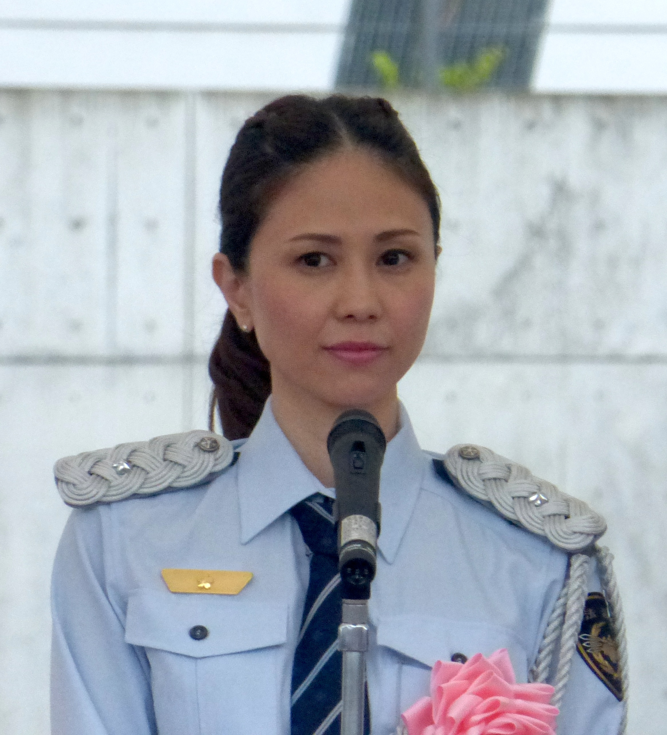 MAX（マックス）は、日本の音楽グループ。東京拘置所にて